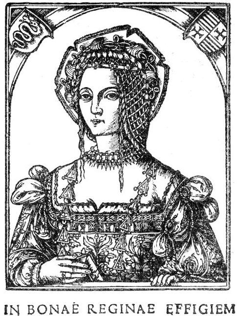 Ilustracja Encyklopedii staropolskiej T.4 457 - Królowa Bona (z drzeworytu)